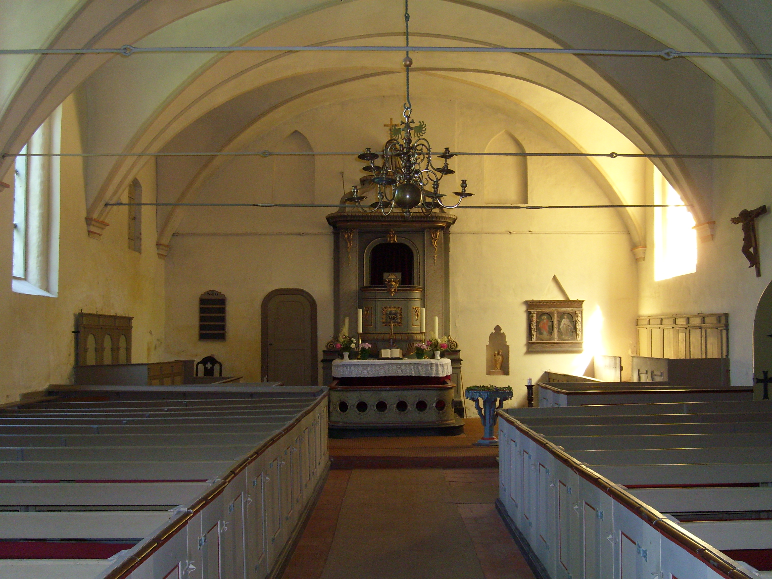 Die Heilig-Kreuz-Kirche in Kemnitz von innen